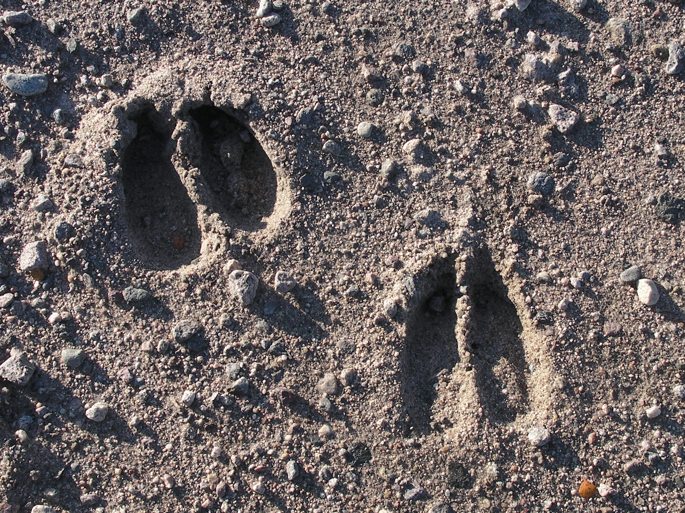 Baie-James, Canada.